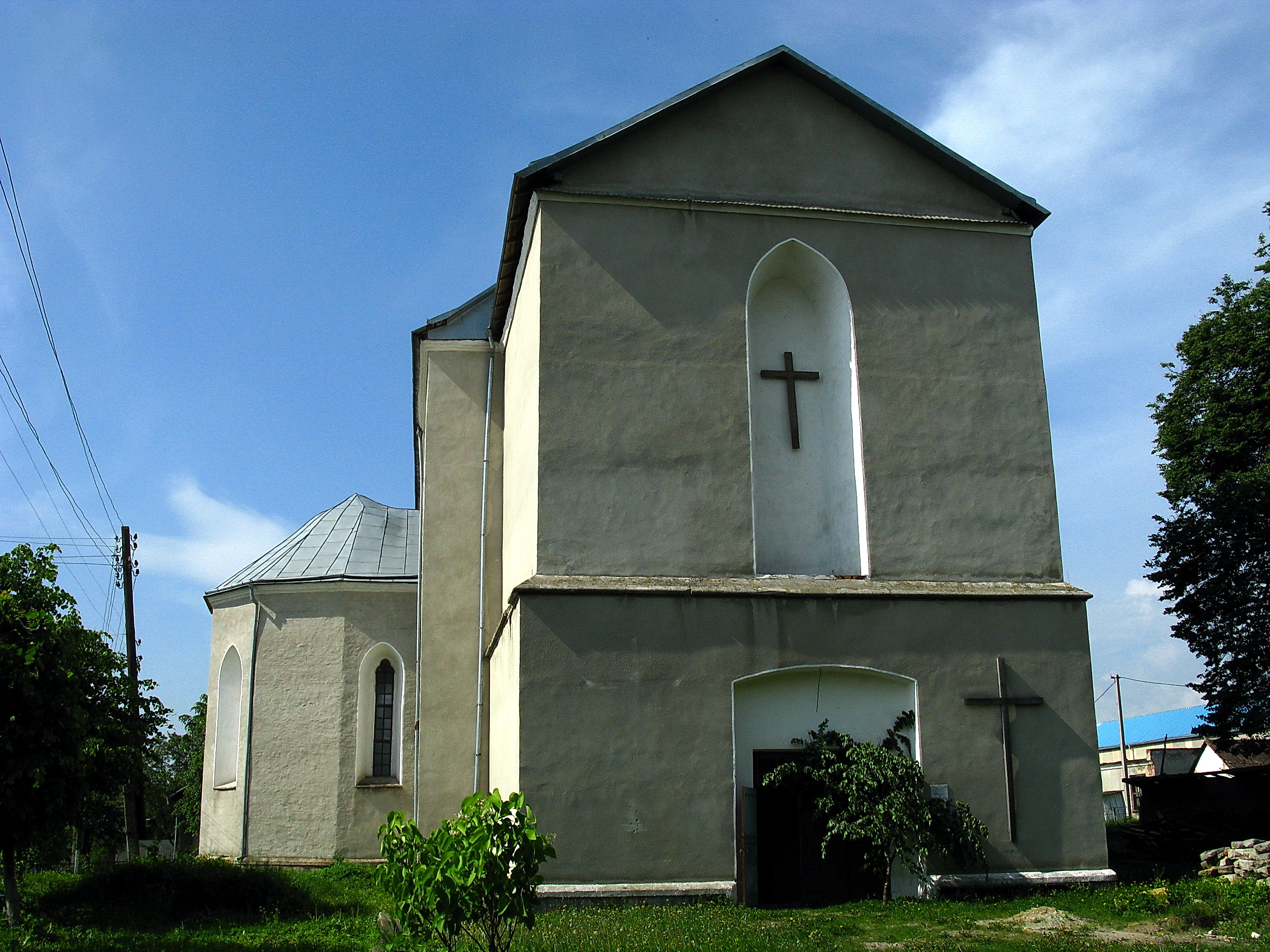 Костел (мурований) у смт Золотий Потік Бучацького району Тернопільської області.